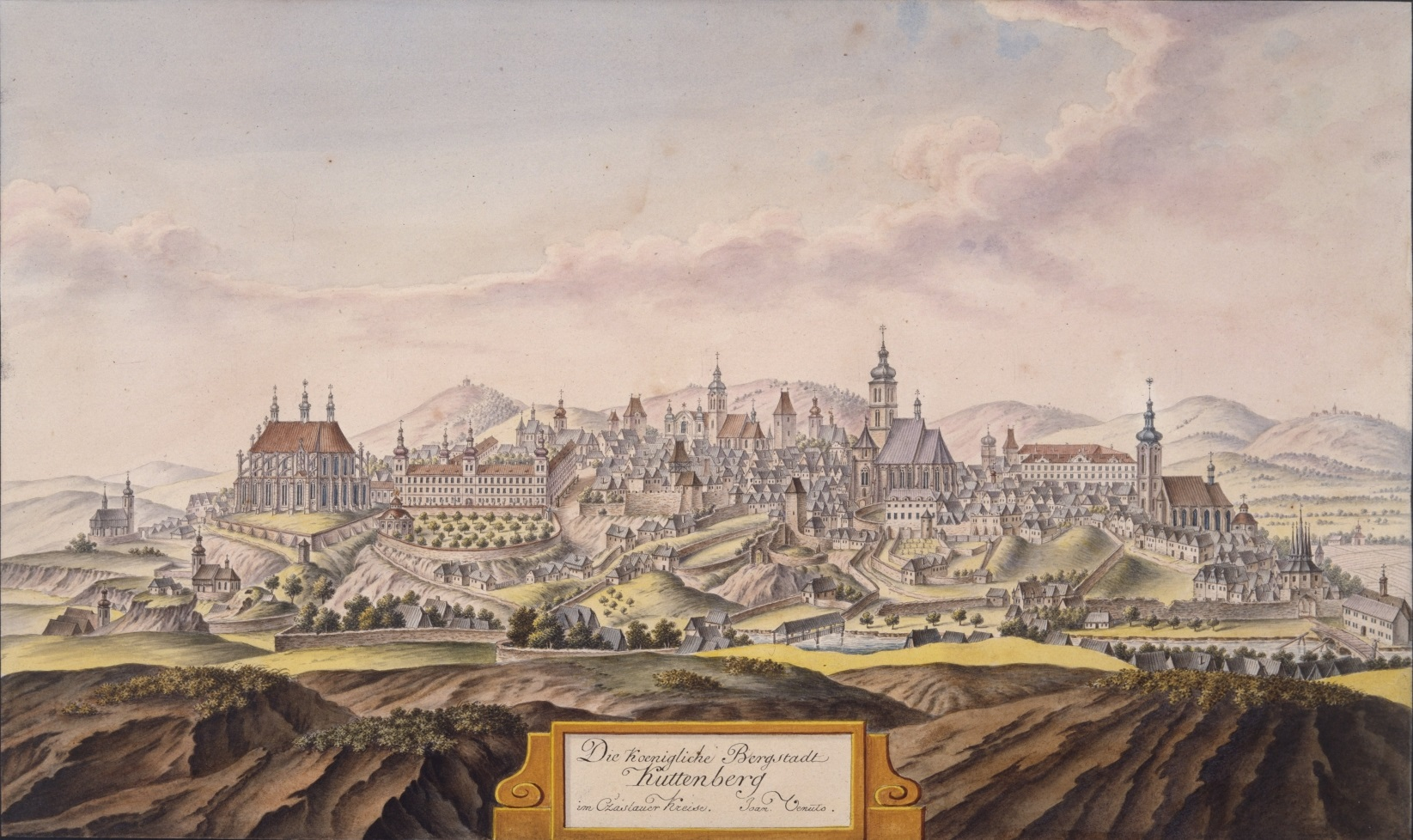 Die koenigliche Bergstadt Kuttenberg im Cžaslauer Kreise Joan Venuto 1815